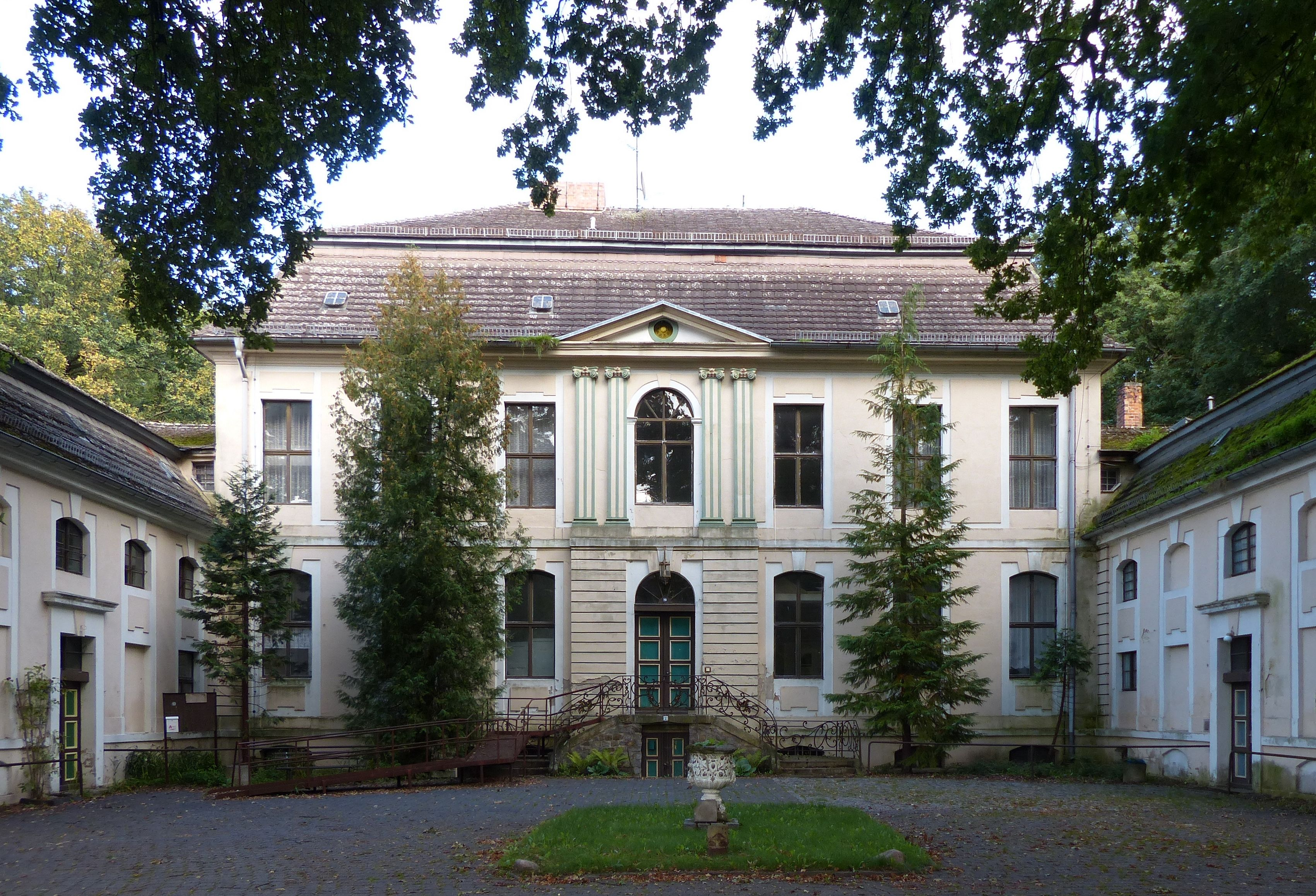 Das Schloss in Schollene - Herrensitz des Rittergutes in diesem Ort - wurde 1752 im Stil des Spätbarock mit Elementen des Klassizismus von einem Berliner Baumeister aus der Nachfolge Andreas Schlüters und Jean de Boldts erbaut. Bis zur Enteignung im Zuge der Bodenreform 1945 hatte es verschiedene Besitzer; zuletzt gehörte es der Familie von Alvensleben. Sogleich nach dem Krieg gewährte es Vertriebenen eine erste Unterkunft, war dann Genesungsheim, danach Krankenhaus. Jetzt ist es ein Altenheim.